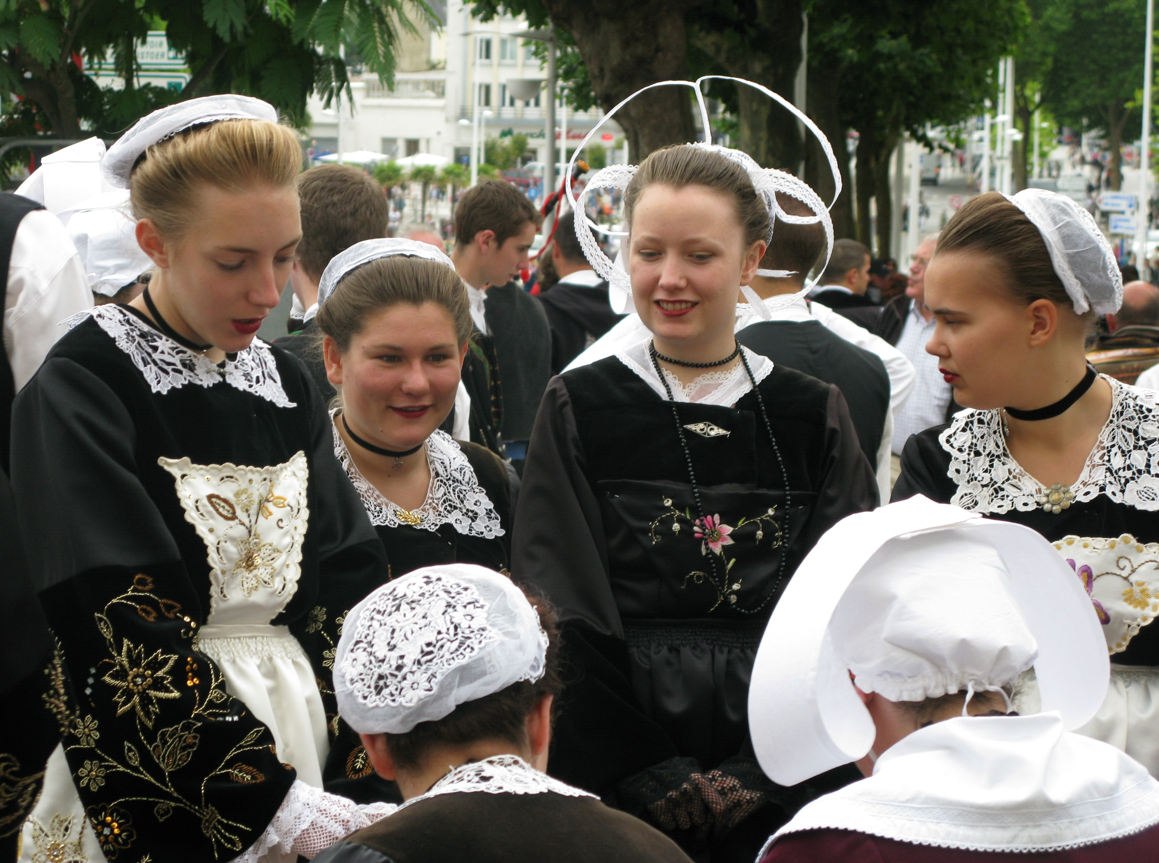 Coiffes bretonnes de plusieurs localités de la région Bretagne en France, prises pendant le Festival Interceltique de Lorient 2009.